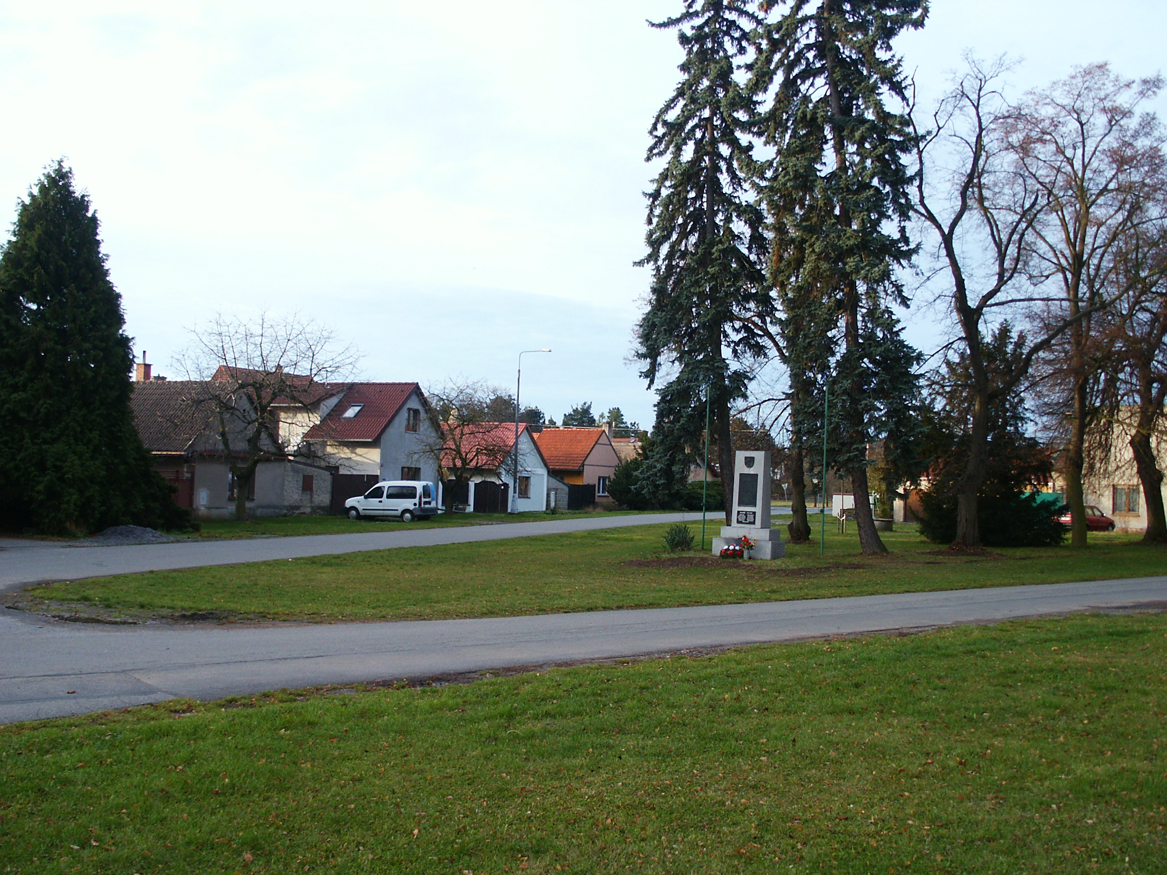 Předhradí - náves